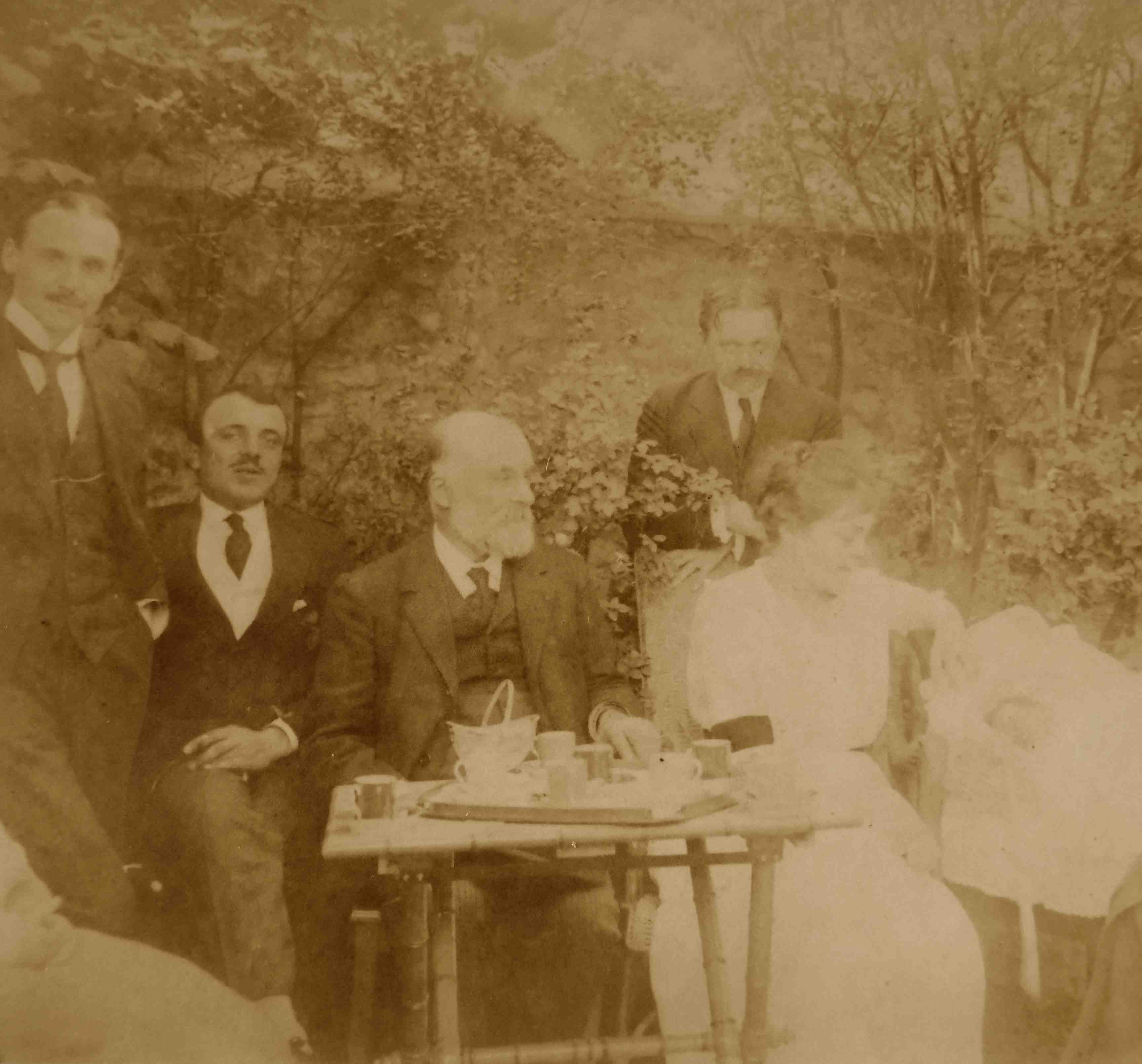 De gauche à droite, Joseph Malègue, Georges Haller, Albin Haller, le Dr Franck Malègue frère de J.Malègue son épouse Geneviève Haller et leur fils nouveau-né